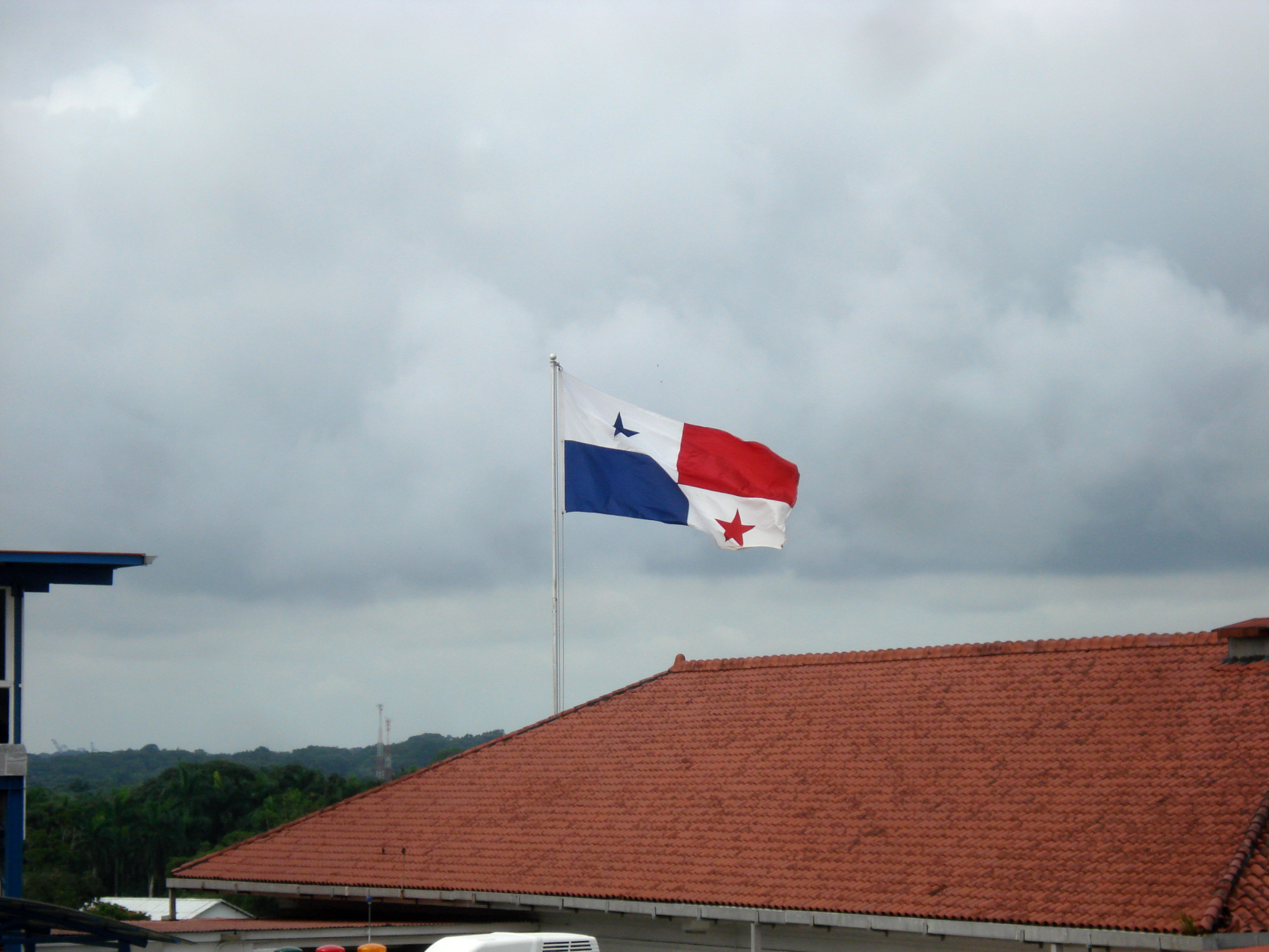 Panama Flag